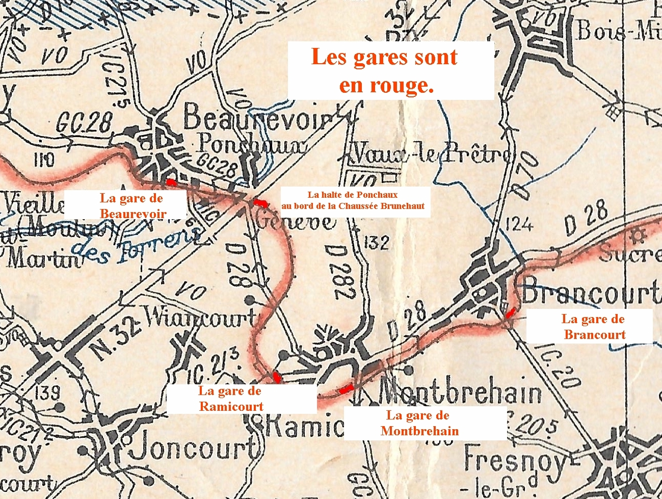 Carte de la ligne vers 1910.